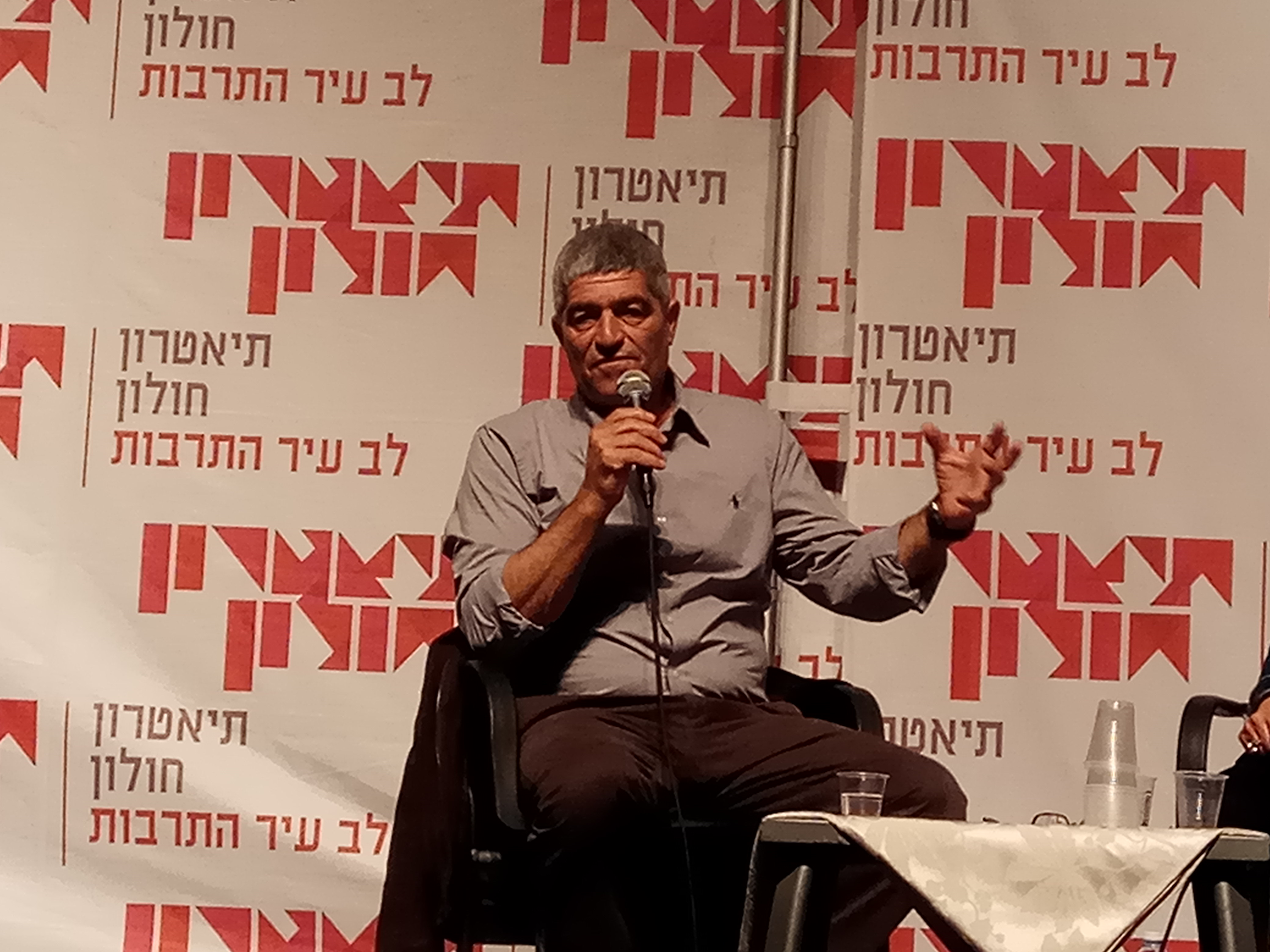 טל רוסו בשבתרבות בחולון